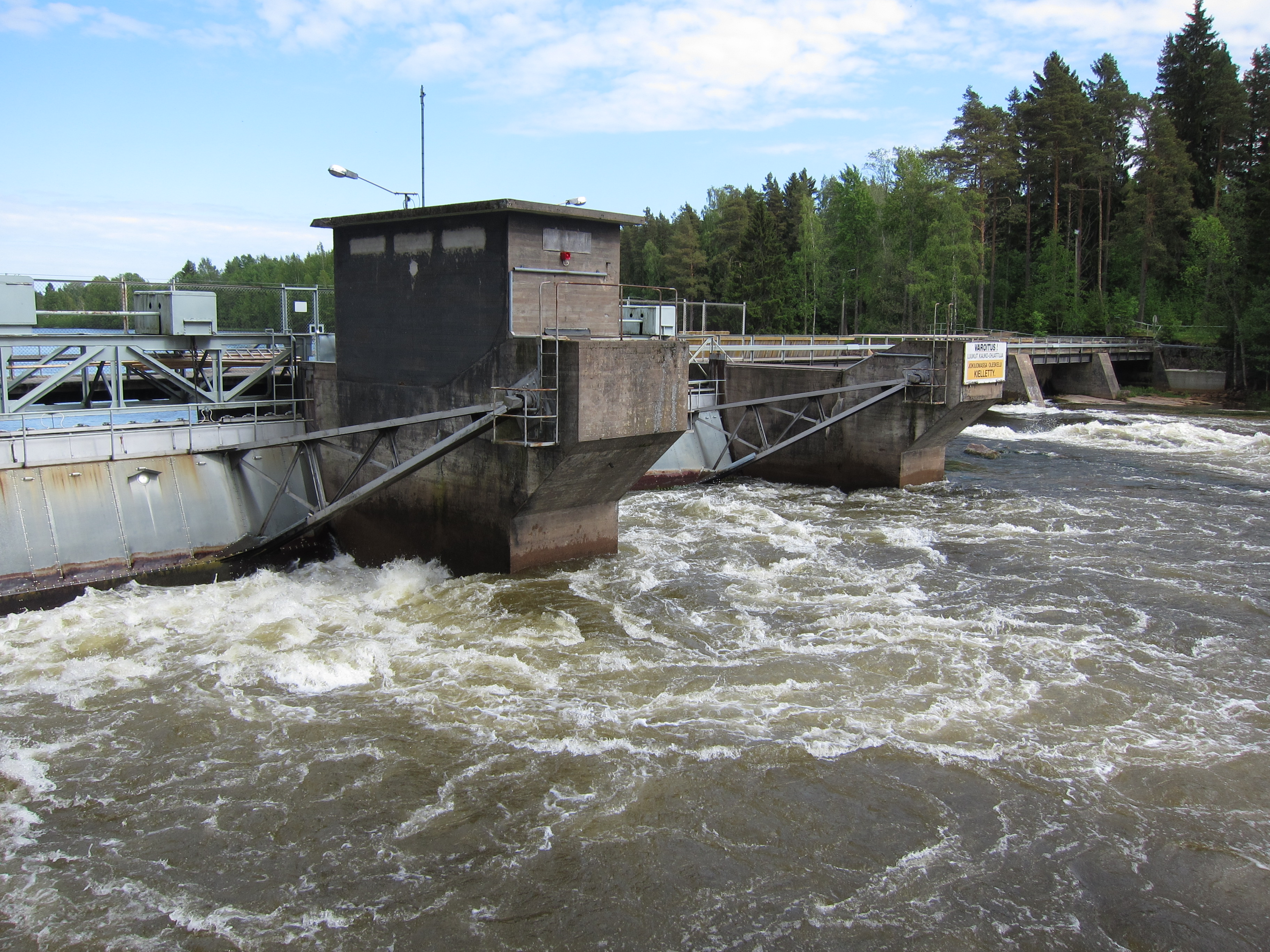 Kymijoen Koivukosken luonnonuomassa oleva säännöstelypato Kotkassa.